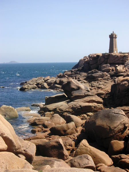 Perros-Guirec, La côte de granit rose et le phare de Ploumanac'h (Juin 2005) Source : Wikipedia allemand [1]